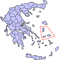 Восточные Спорады на карте Греции